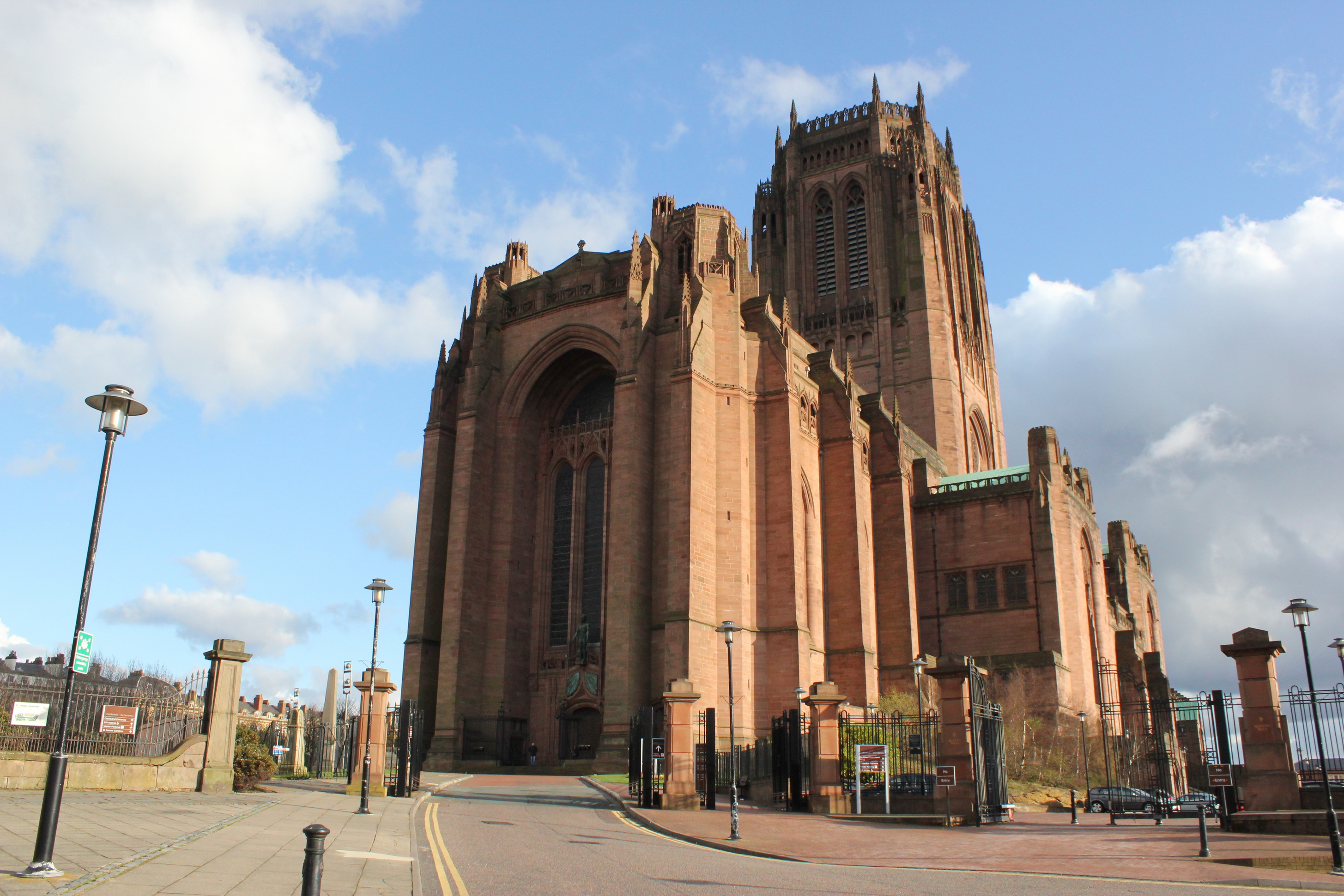 Die Kathedrale von Liverpool, eine der größten neugotischen Kirchen Europas.